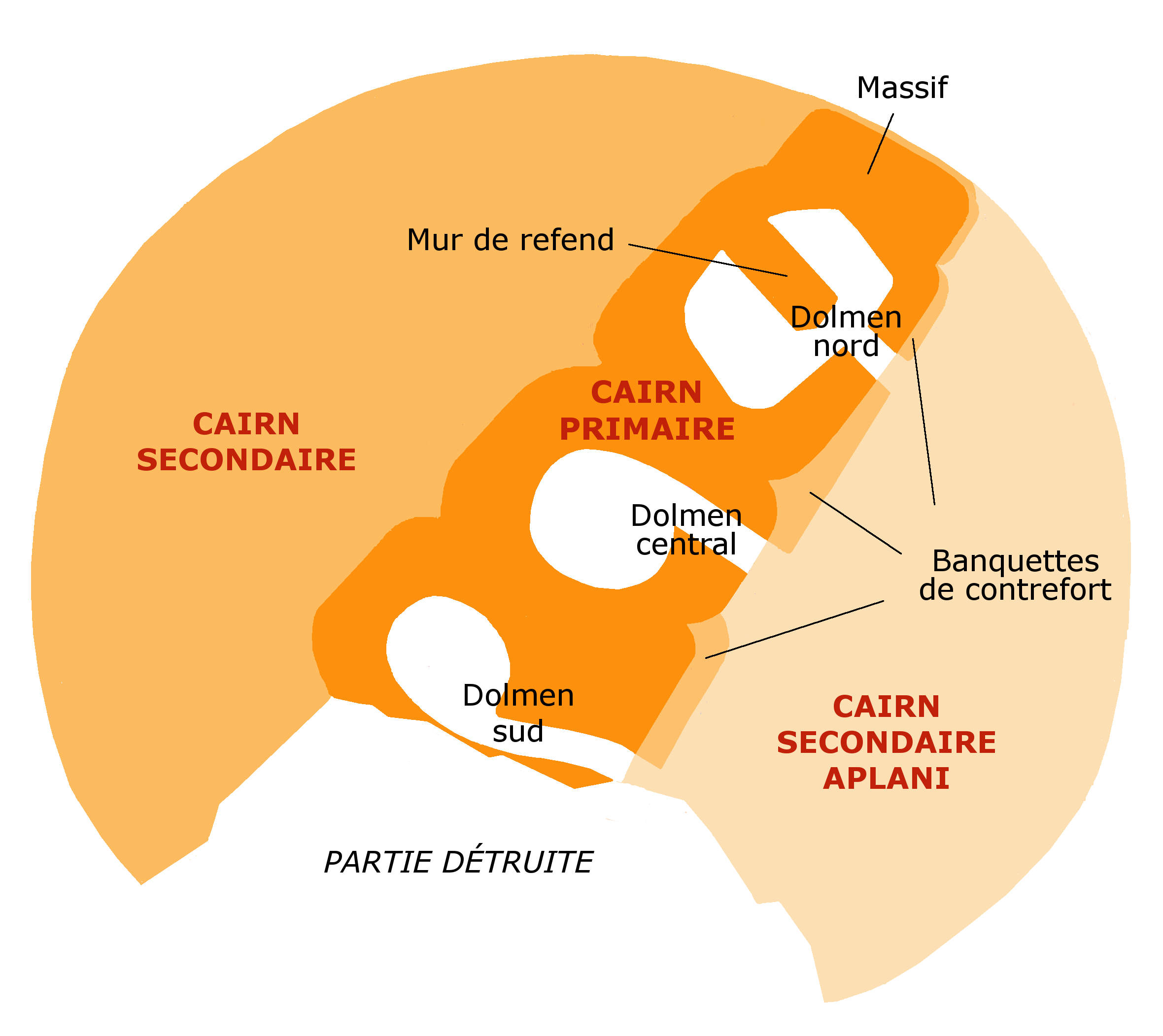 Plan approximatif du cairn de l'île Carn, en Ploudalmézeau, au nord du Bas-Léon, Finistère, Bretagne. Ne cherchant qu'à faire comprendre l'organisation de ce cairn, je me suis inspiré, mais grossièrement, sans respect des formes ni des proportions, de 3 croquis de Pierre-Roland Giot, planches C2, C2' et C2" de Barnenez, Carn, Guennoc, Université de Rennes I, 1987, t. II.